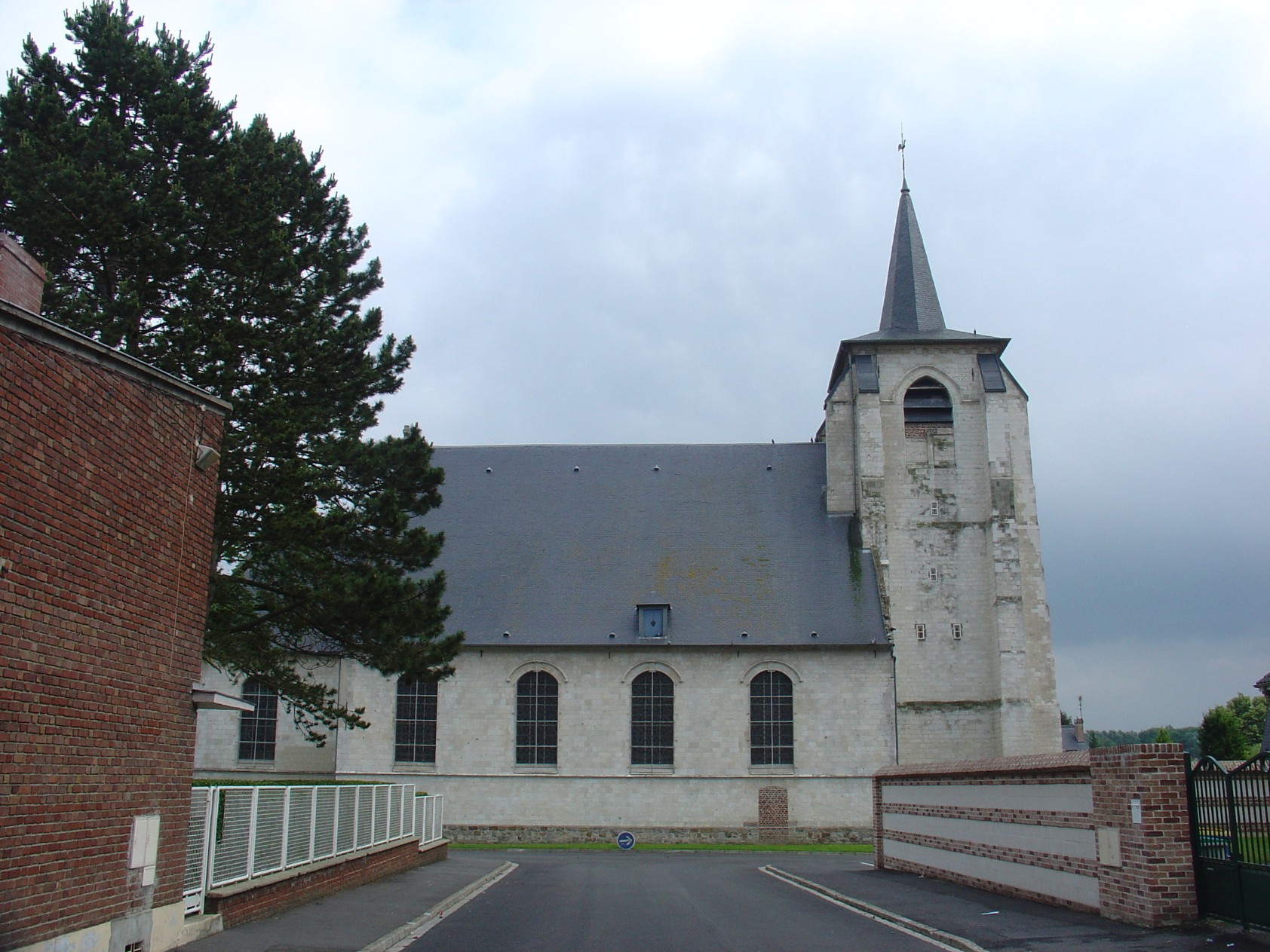 Église de Dainville